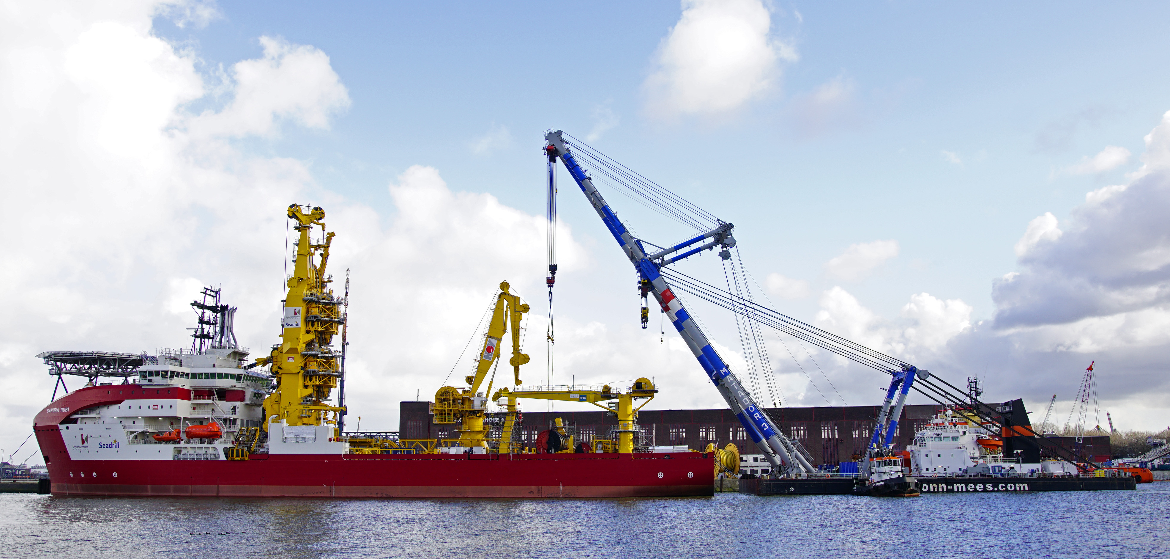 Franklin offshore Heysehaven Rotterdam 3-2-2016